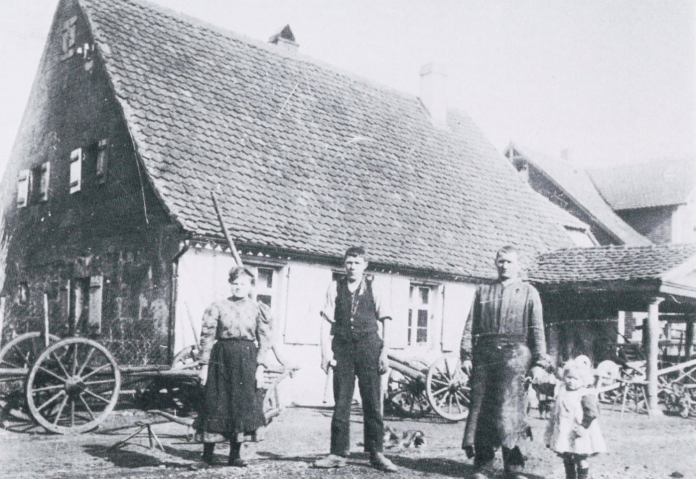 Eltersdorf. Eltersdorfer Schmiede. Haus-Nr. 70 (heute Egidienplatz 5). Das Haus wurde 1901 abgerissen und durch einen Neubau ersetzt, der in seiner Form noch heute besteht. Das Bild zeigt unter anderem den damaligen Schmiedemeister Konrad Hörner und dessen Gesellen Hollfelder.